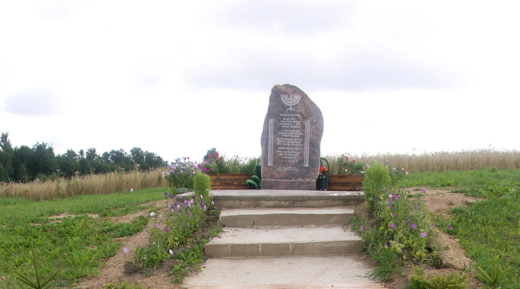 Бобыничи, Полоцкий район. Памятник убитым в 1942 году евреям - узникам Бобыничского гетто.